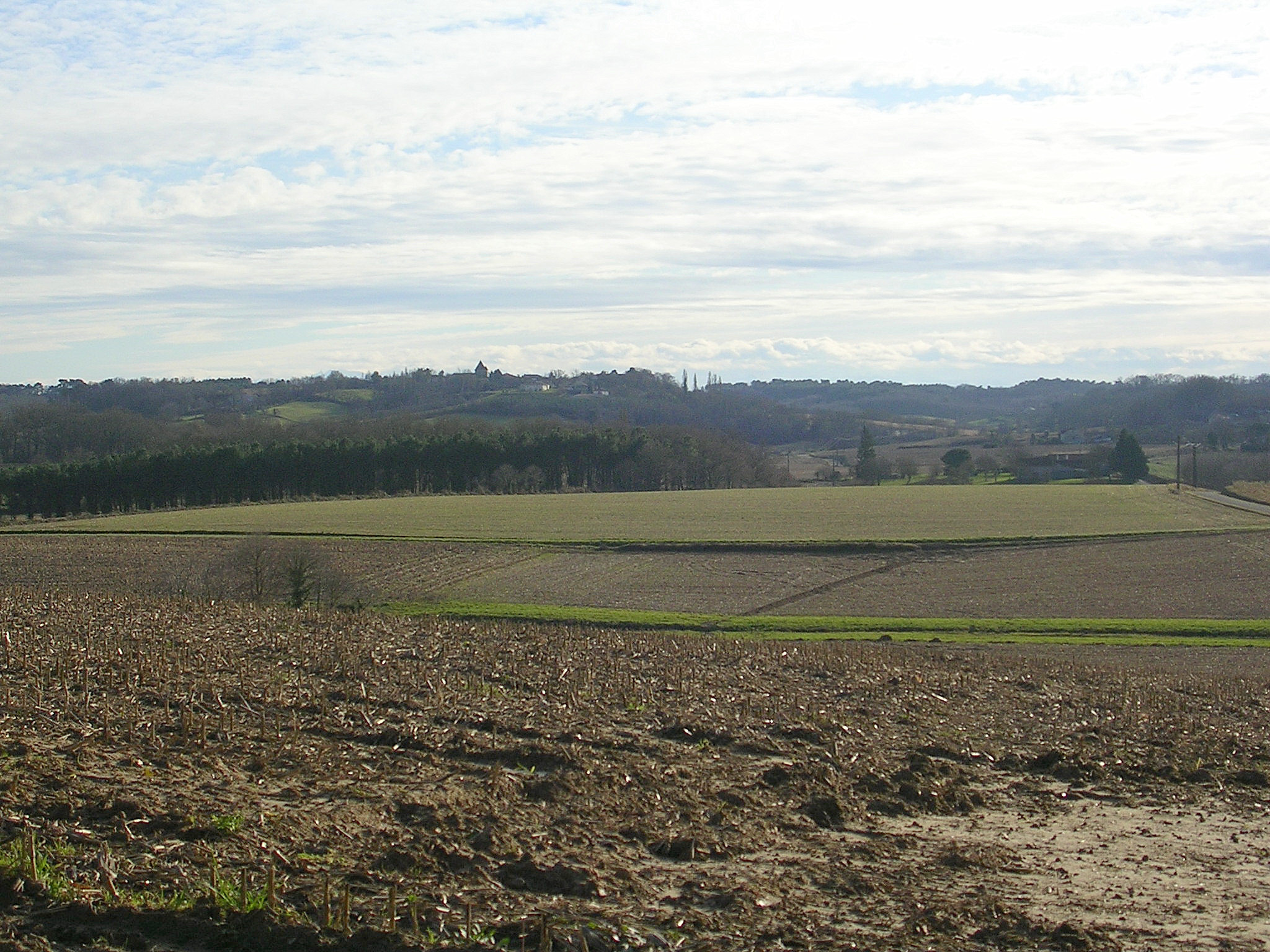 Paysage de Chalosse, dans le département français des Landes